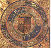 Jan II. kastilský